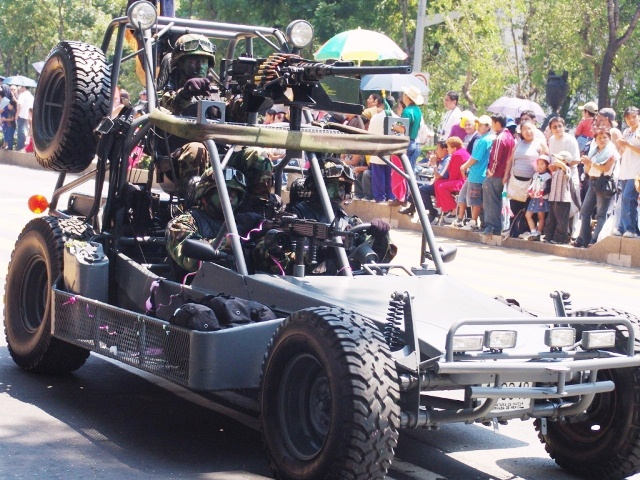 vehiculo de asalto